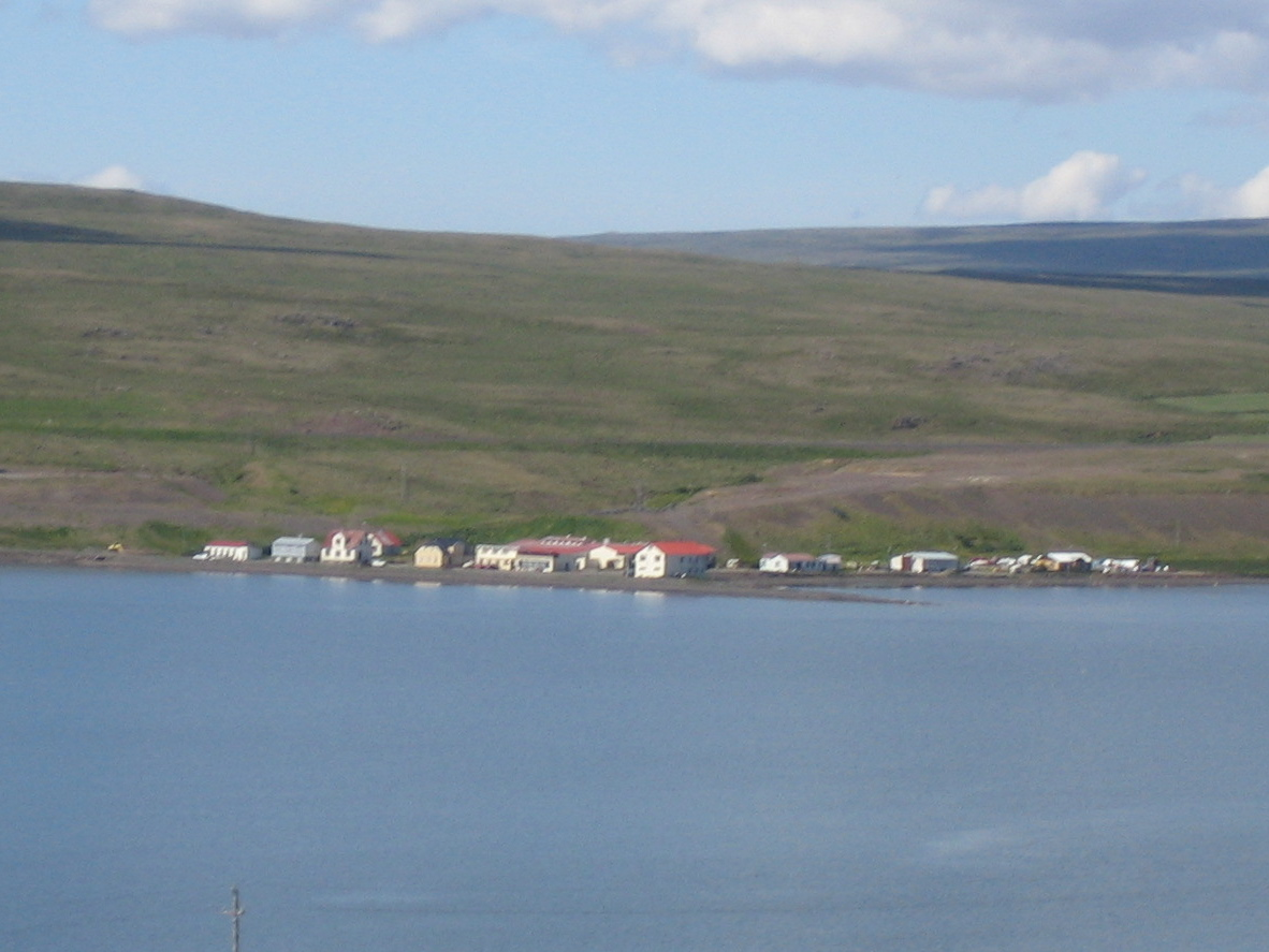 Borðeyri í Hrútafirði